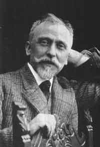 Fotografia di Vamba scattata oltre 70 anni fa, quindi di pubblico dominio. (Fonte: Biblioteca delle giovinette)